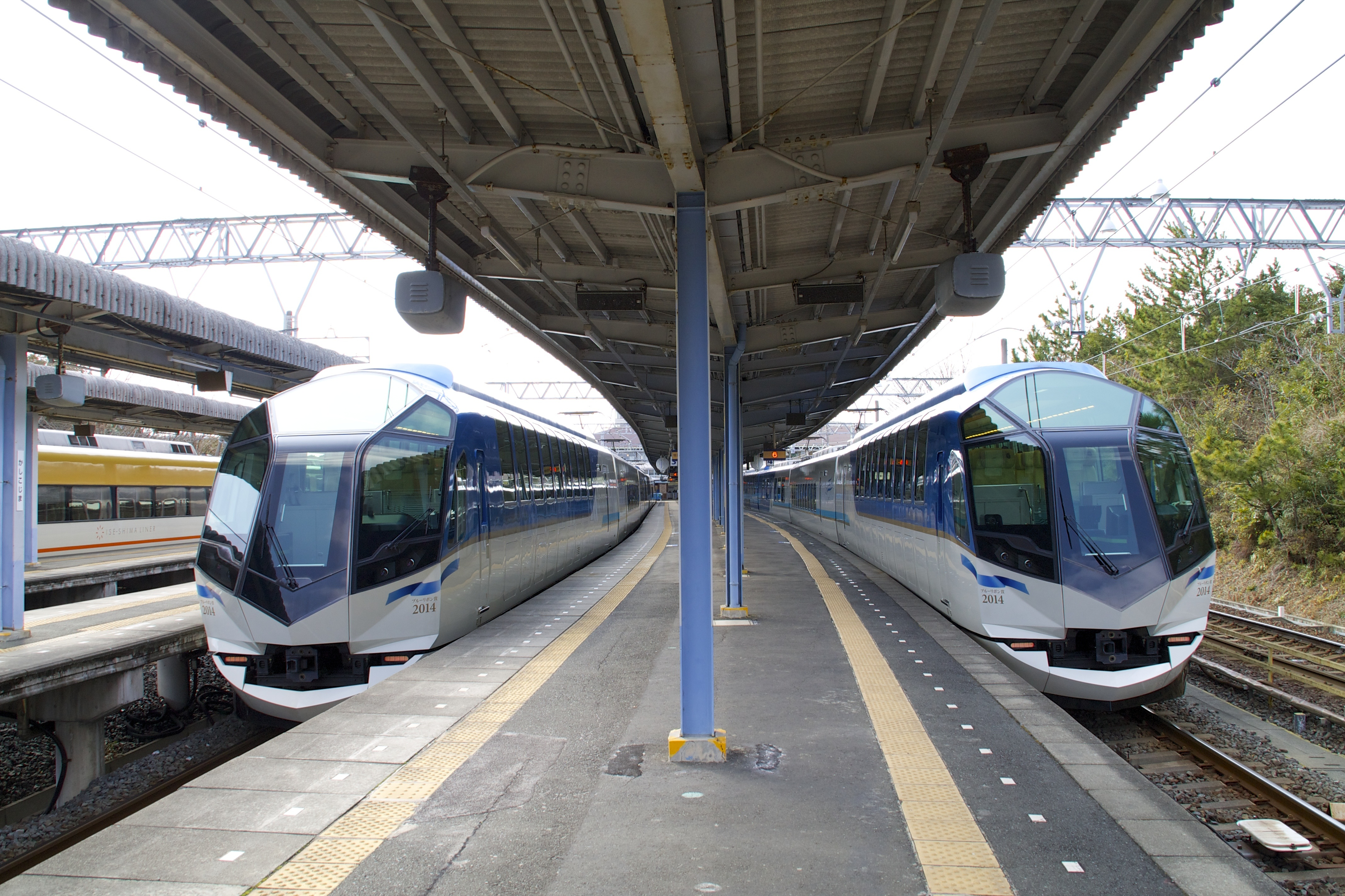 Limited Exp. Shimakaze